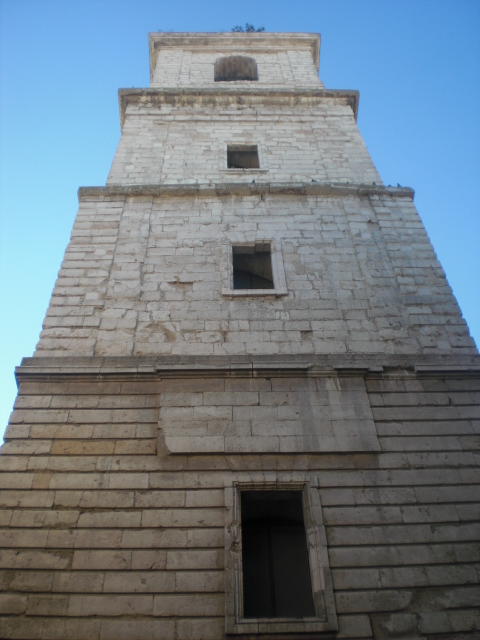 Turo de la katedralo de Ciudad Real